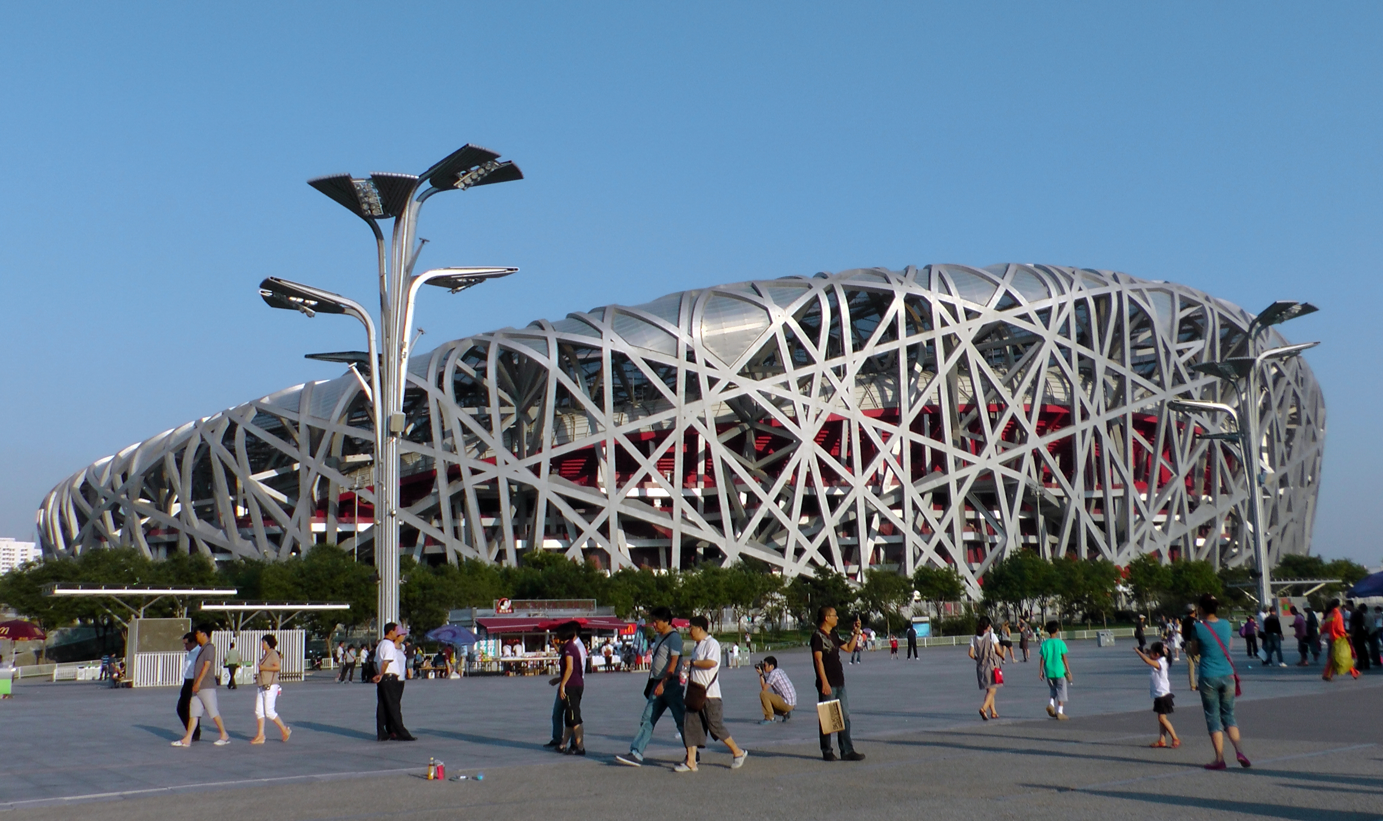 Le stade national de Pékin en août 2012.